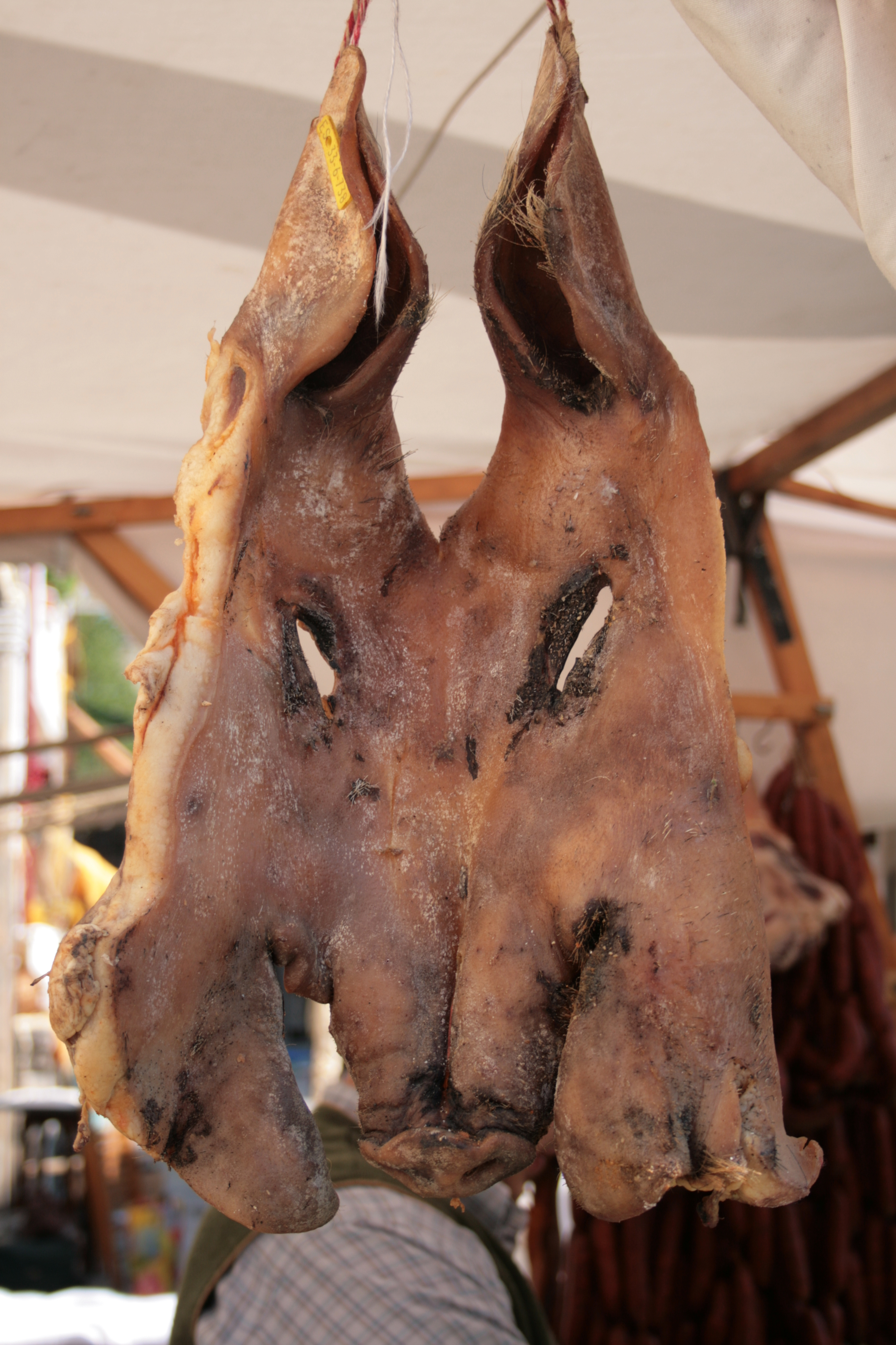 Schweinemaske beim Pökeln